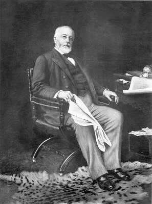 Der englische Geschäftsmann und KunstSammler Sir Henry Tate (1819-1899)